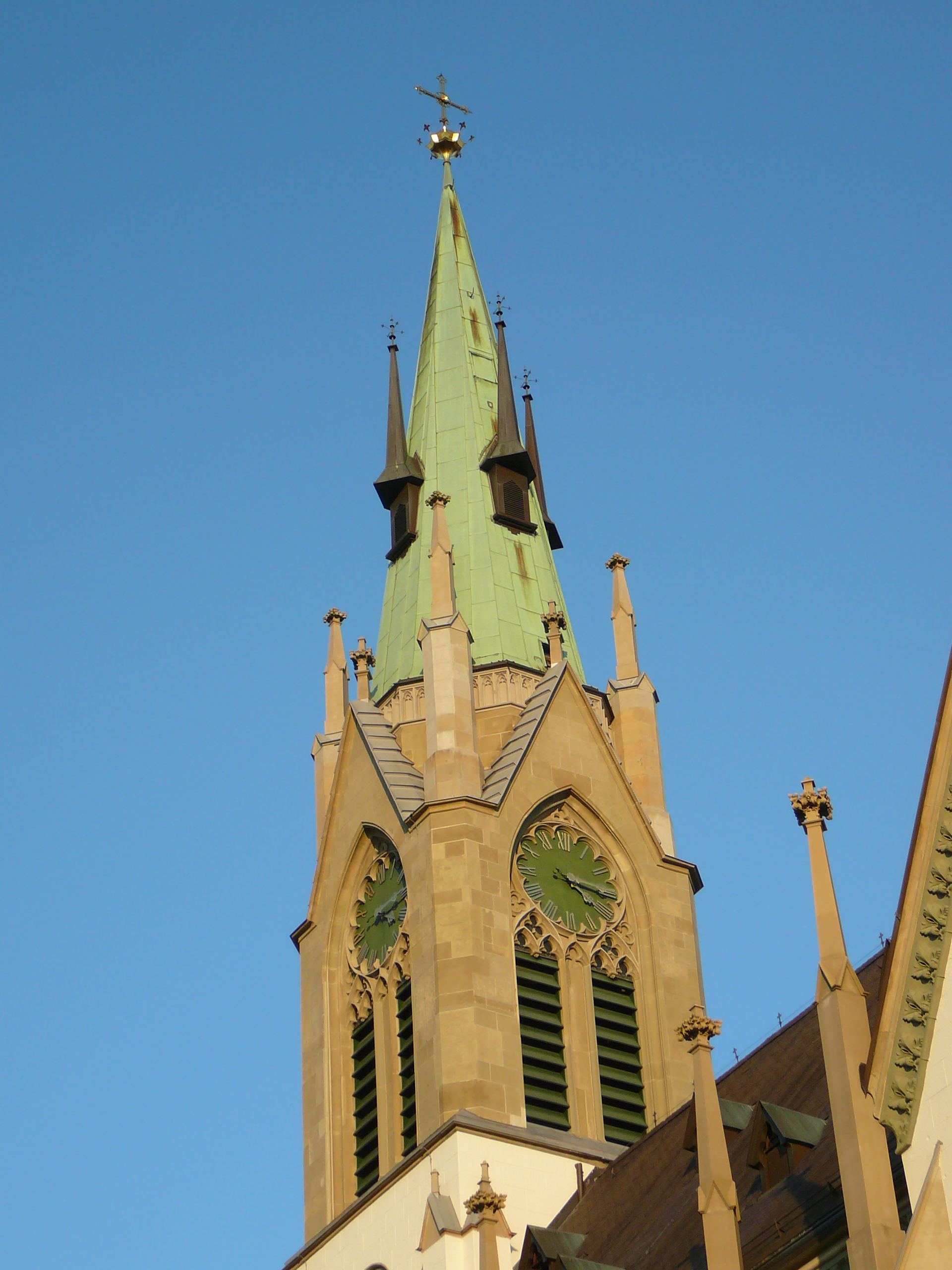 Römisch-katholische Pfarrkirche St. Peter und Paul Winterthur-Neuwiesen, Kirchturm